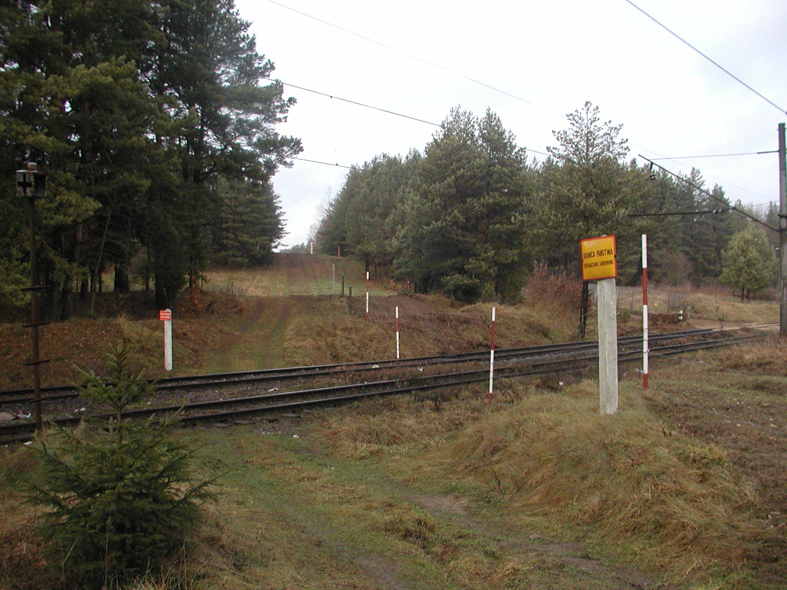 Granica Polski na linii kolejowej Białystok-Grodno